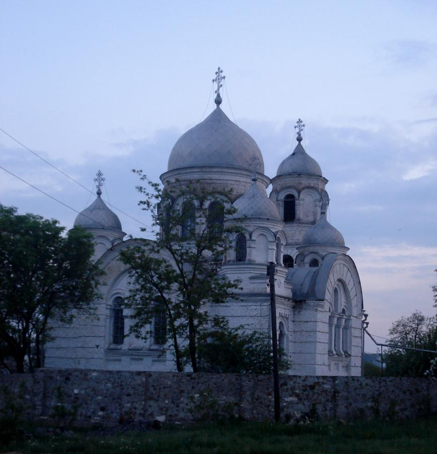 Красносулинский Свято-Покровский храм